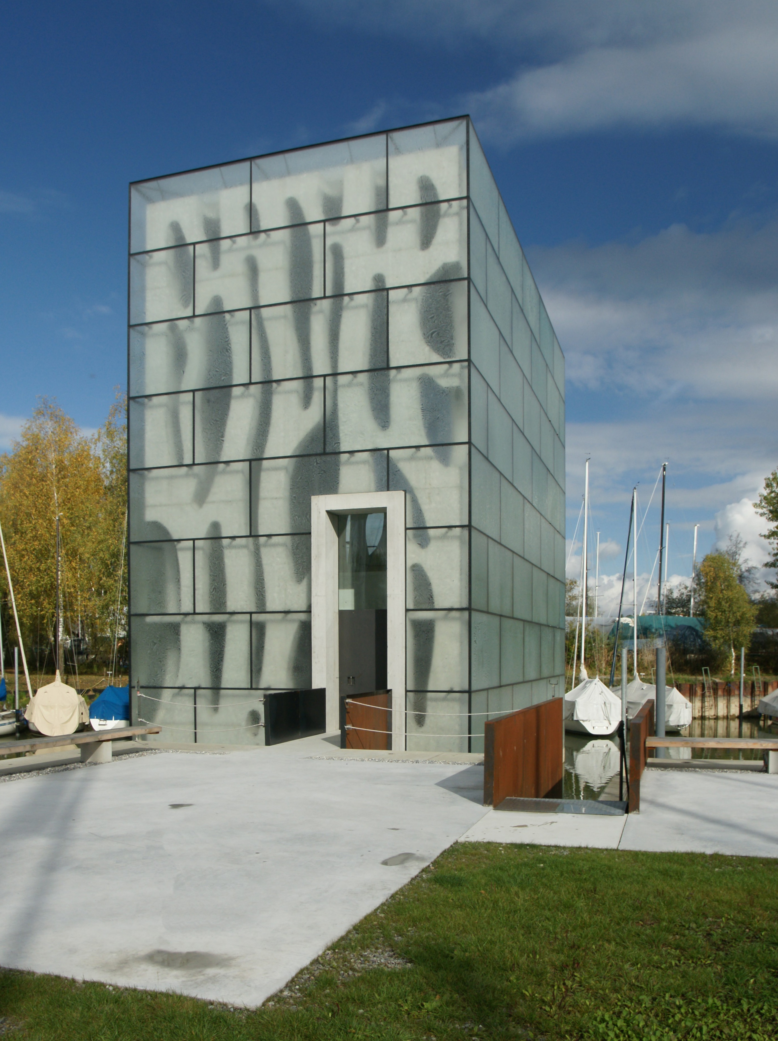 Das "Nordwesthaus" ist ein Club- und Bootshaus im Nordwesten des Rohner Hafen in Fußach, Vorarlberg. Architekturbüro: Baumschlager & Eberle erbaut 2008.